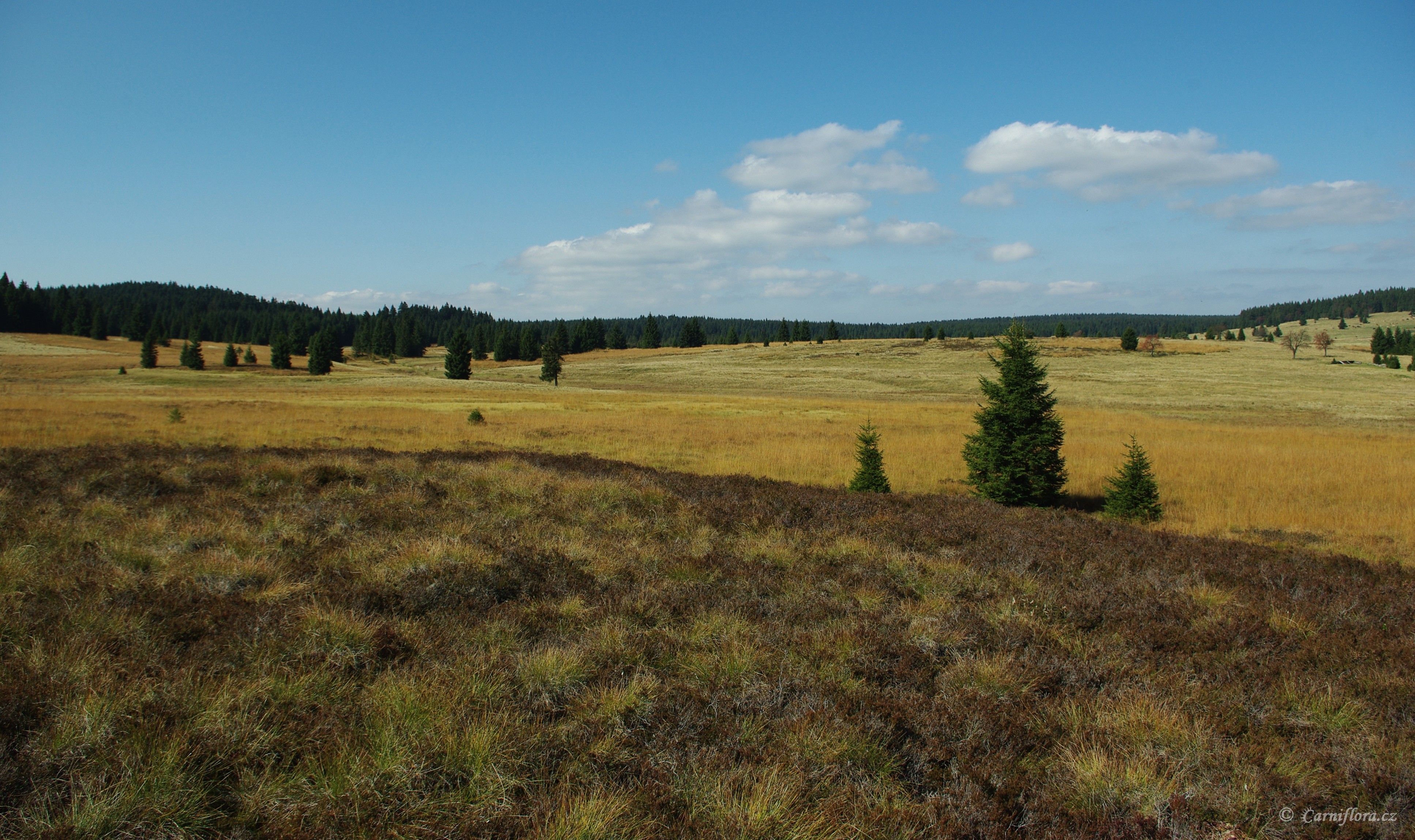 Přebuské vřesoviště, pozůstatek odtěženého vrchoviště s typickou fórou a faunou.